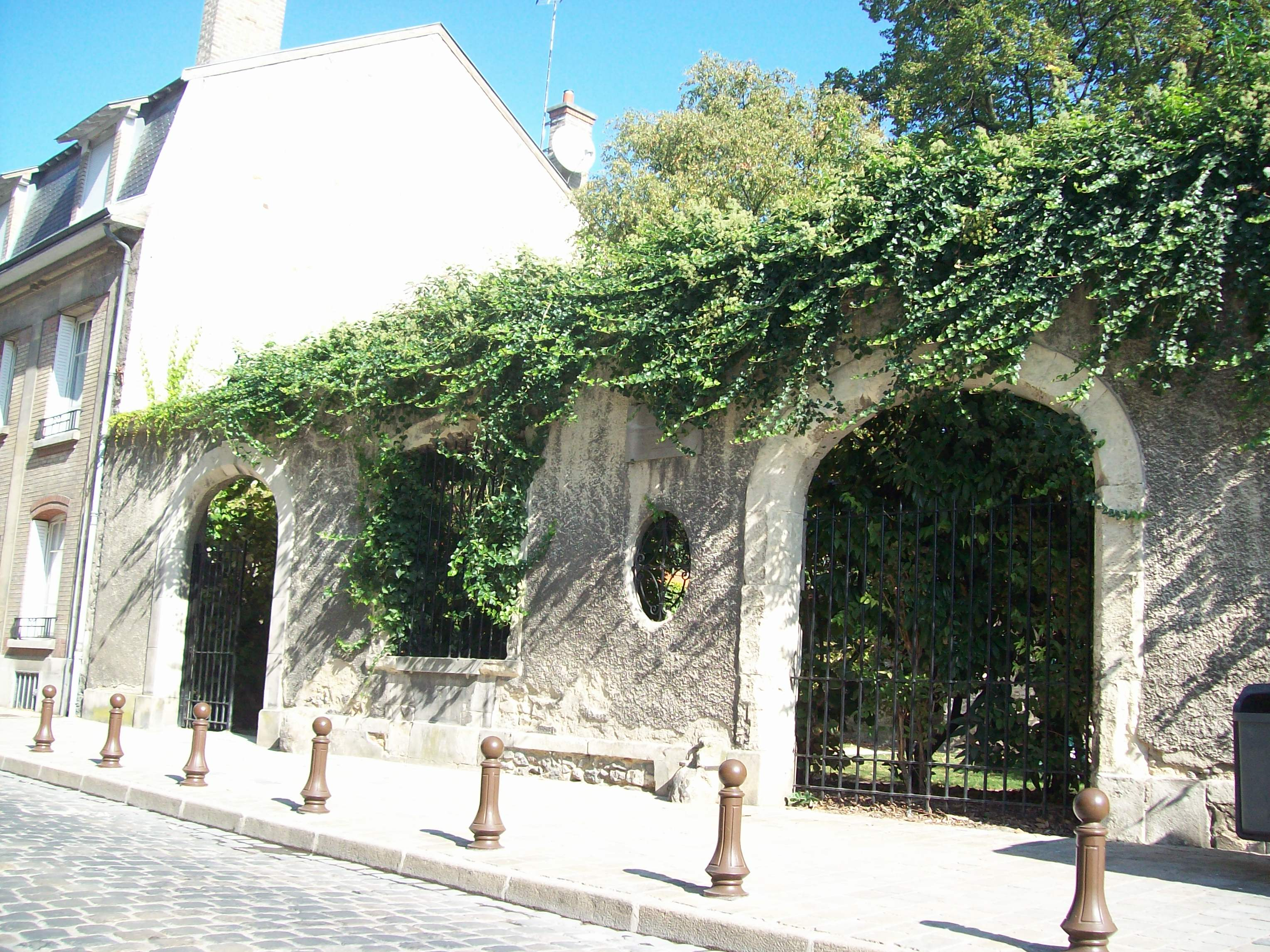 L'entrée du square Charles-Sarazin — Reims, Champagne-Ardenne, France